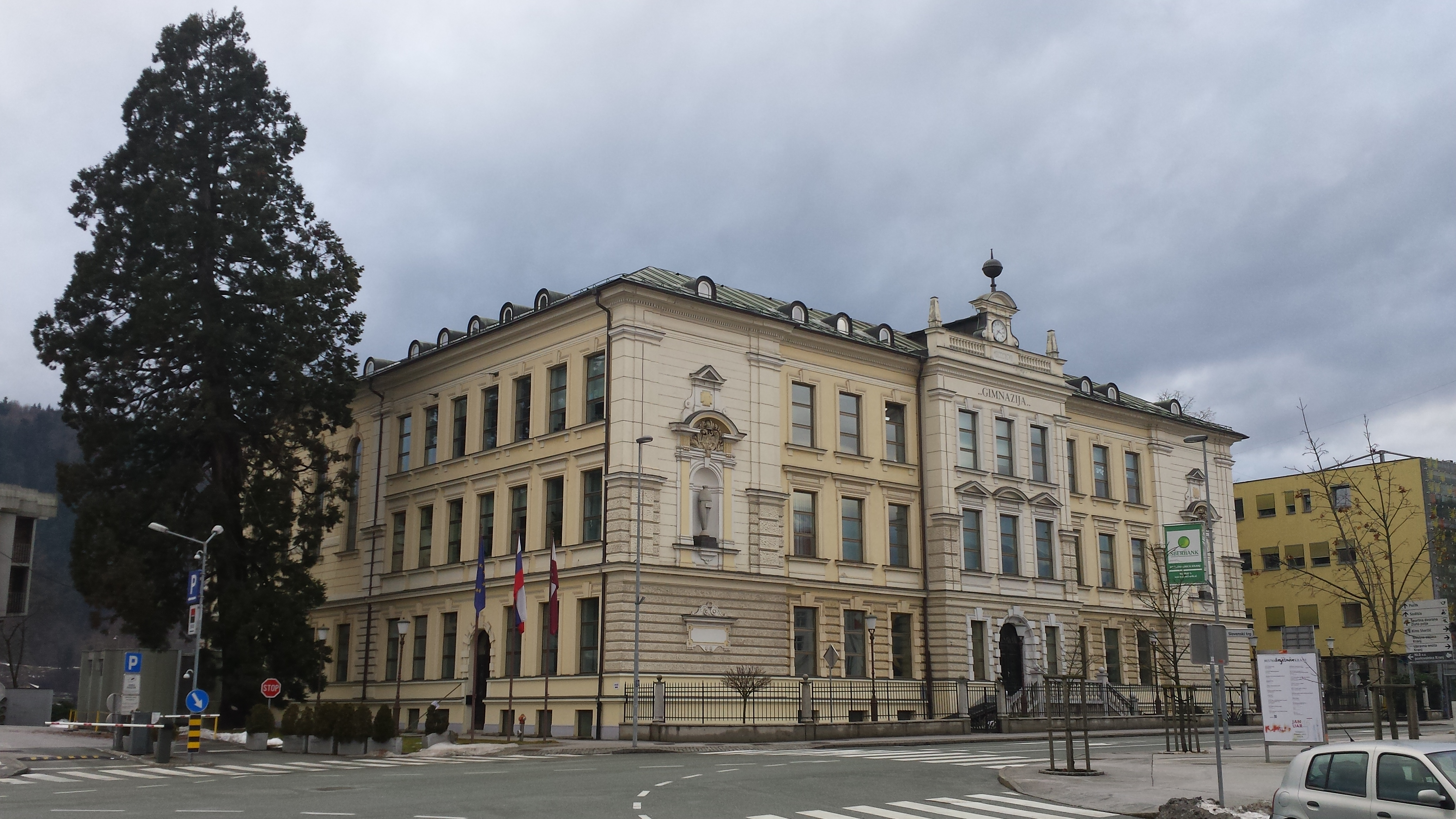 Sekvoja pri Gimnaziji Kranj. Avtor: M. Mravlja